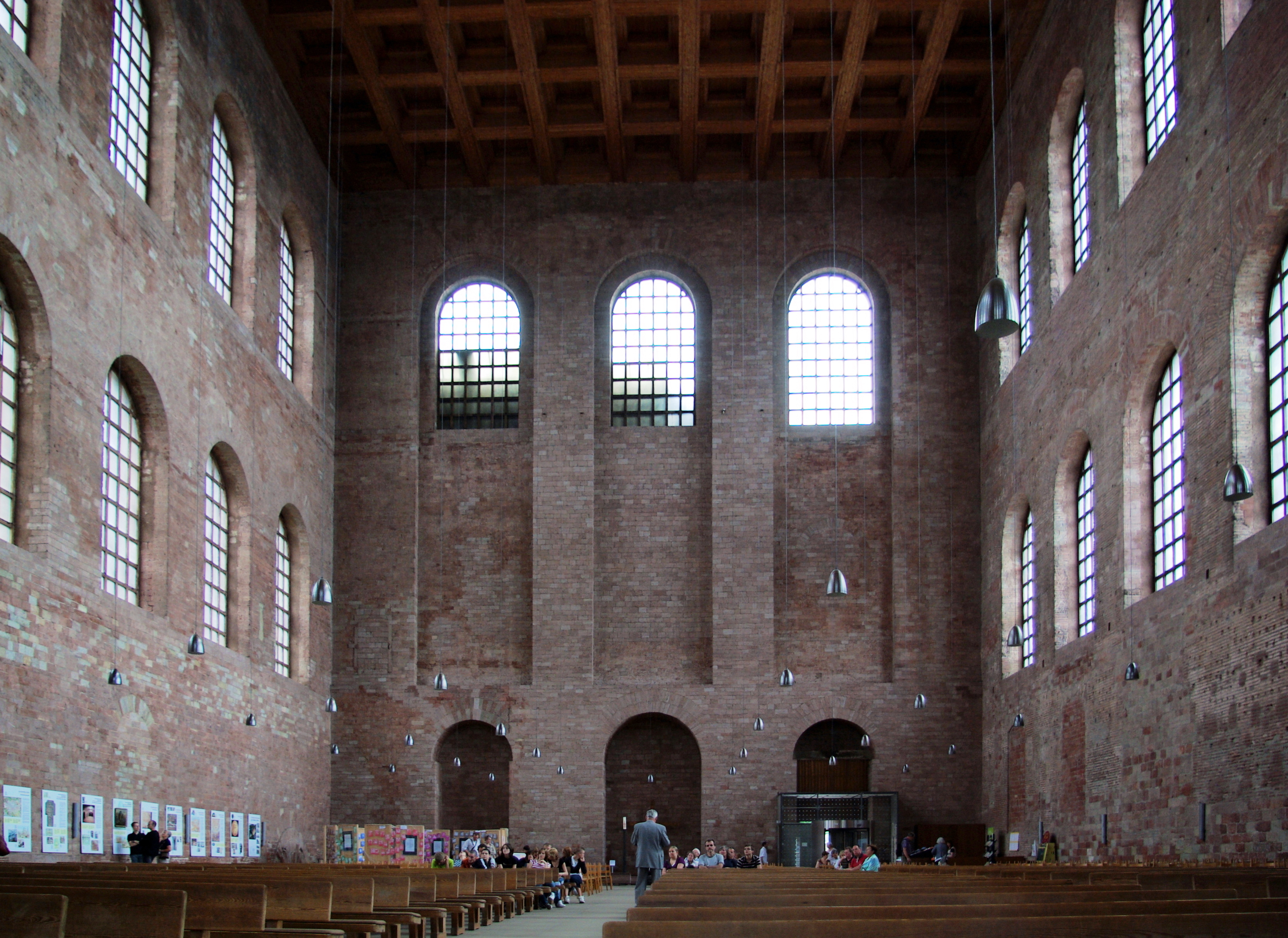 Trier, Konstantinbasilika